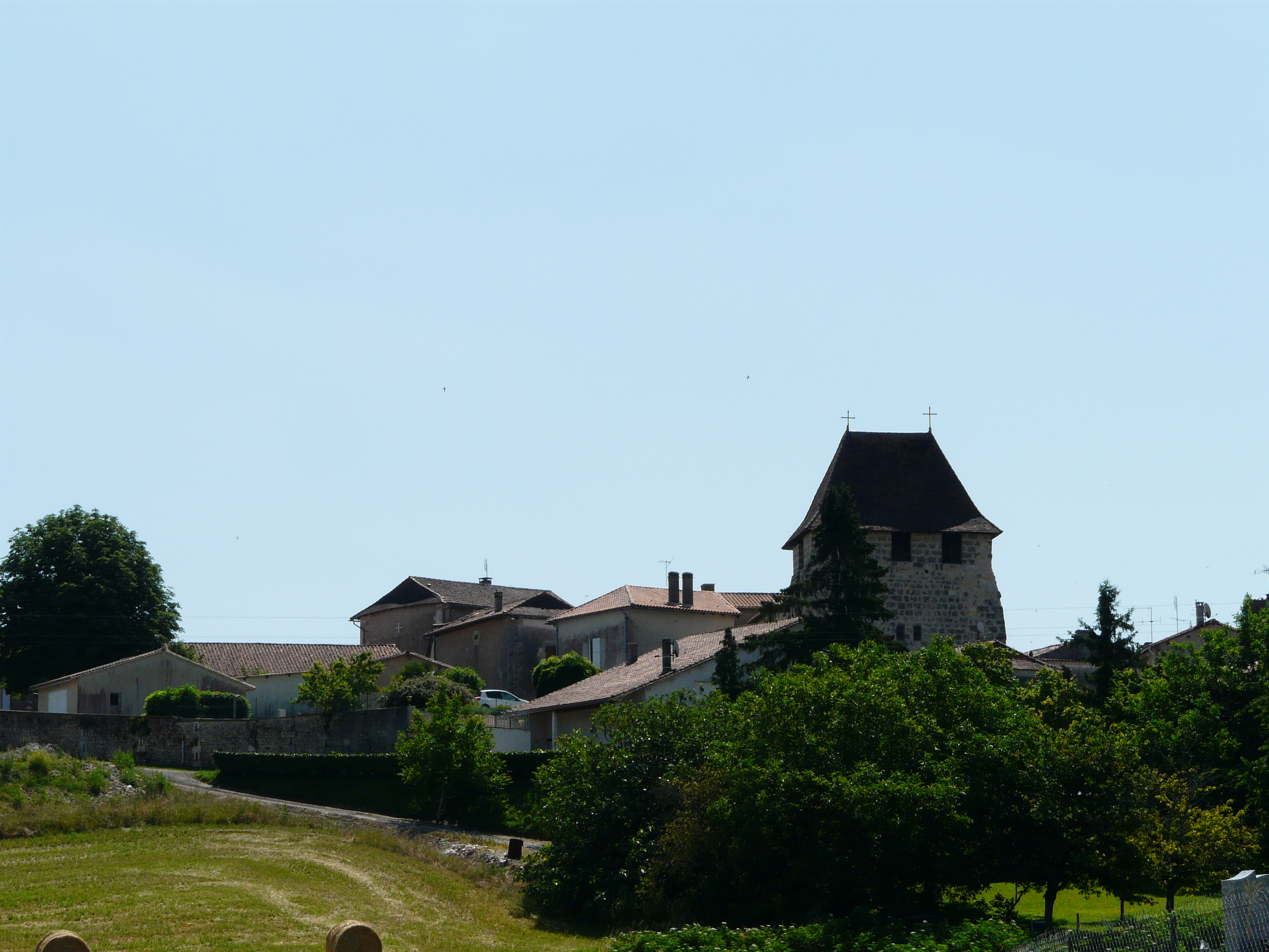 Le village de Saint-Sulpice-de-Roumagnac, Dordogne, France.